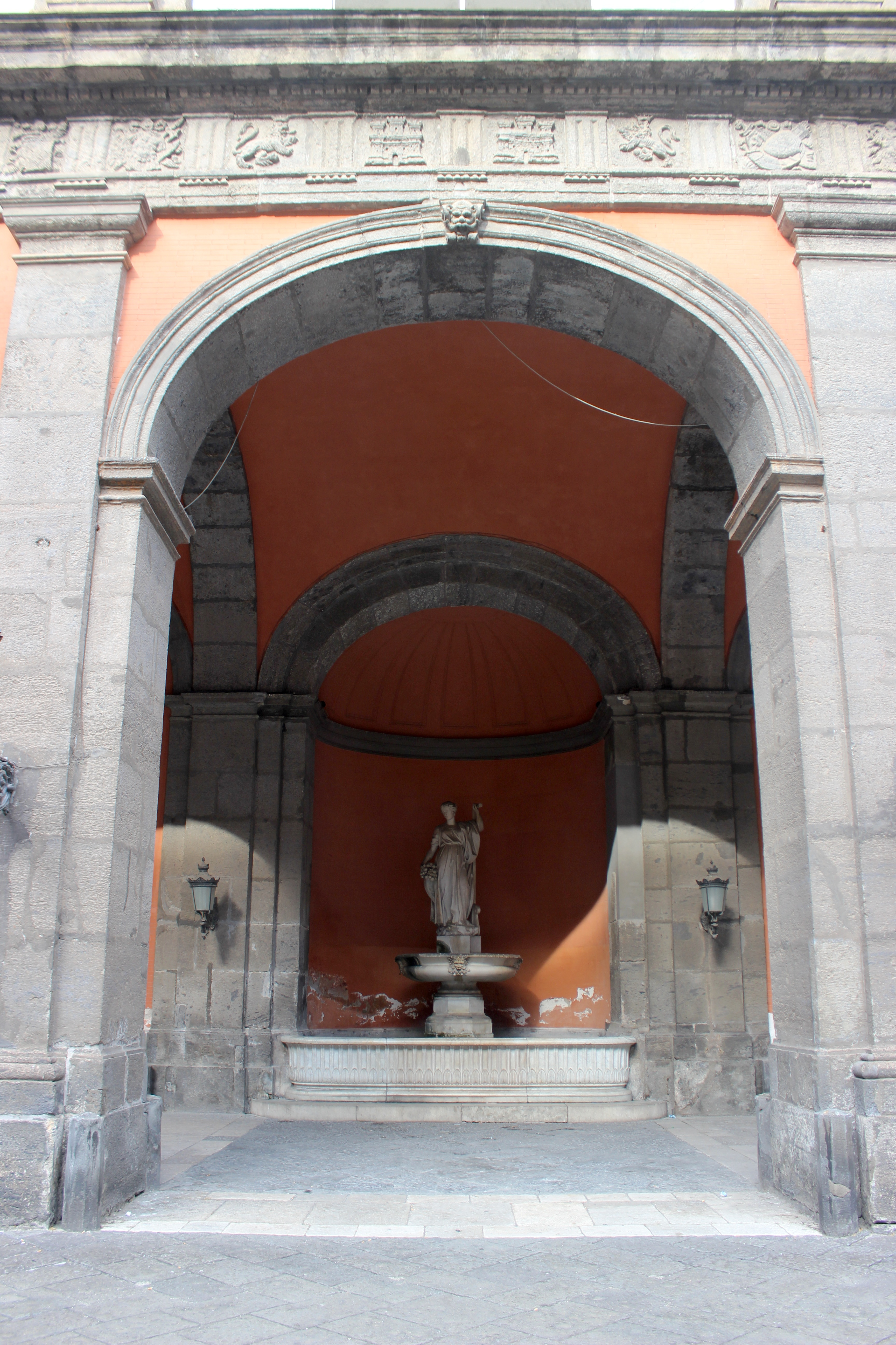 Nápoles. Palacio Real. Patio.